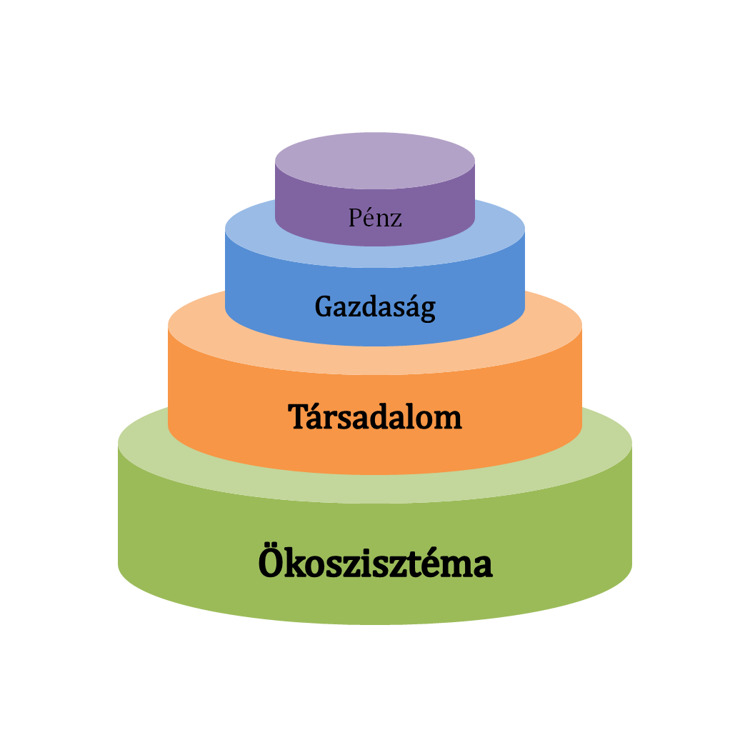 A fenntarthatóság egymásra épülő szintjei az "erős fenntarthatóság" megközelítés szerint